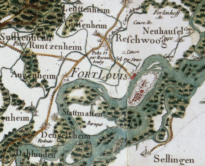 extrait de la carte de Cassini (1756-1815) sur la commune de Fort-Louis (Bas-Rhin)